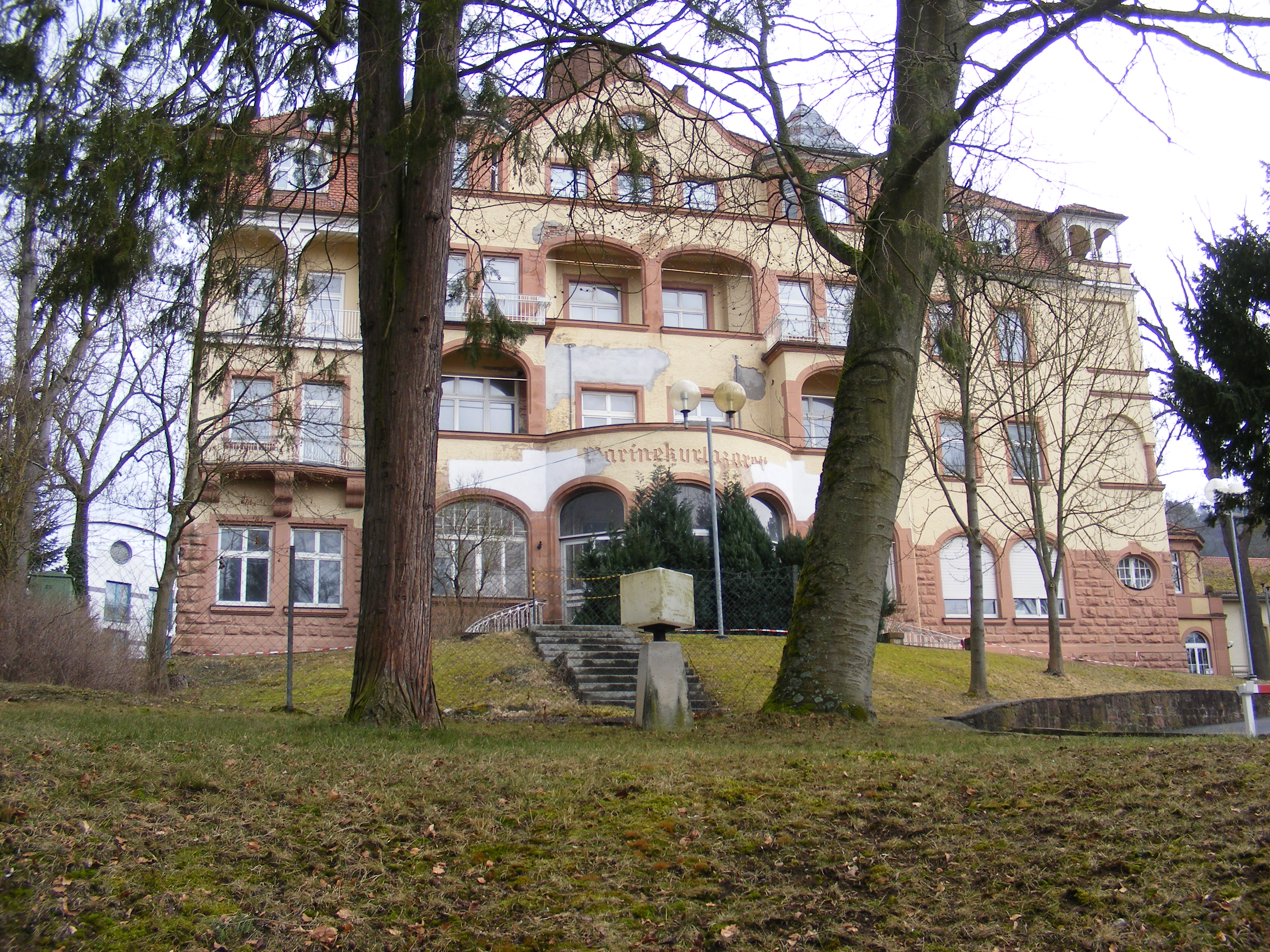 Bad Kissingen - Marinekurlazarett, erbaut um 1910, ca. 15.000 m2, Außenansicht frontal, seit Jahren leerstehend, Kurhausstraße 11; mit Ausbesserungen sichtbarer Verfallserscheinungen